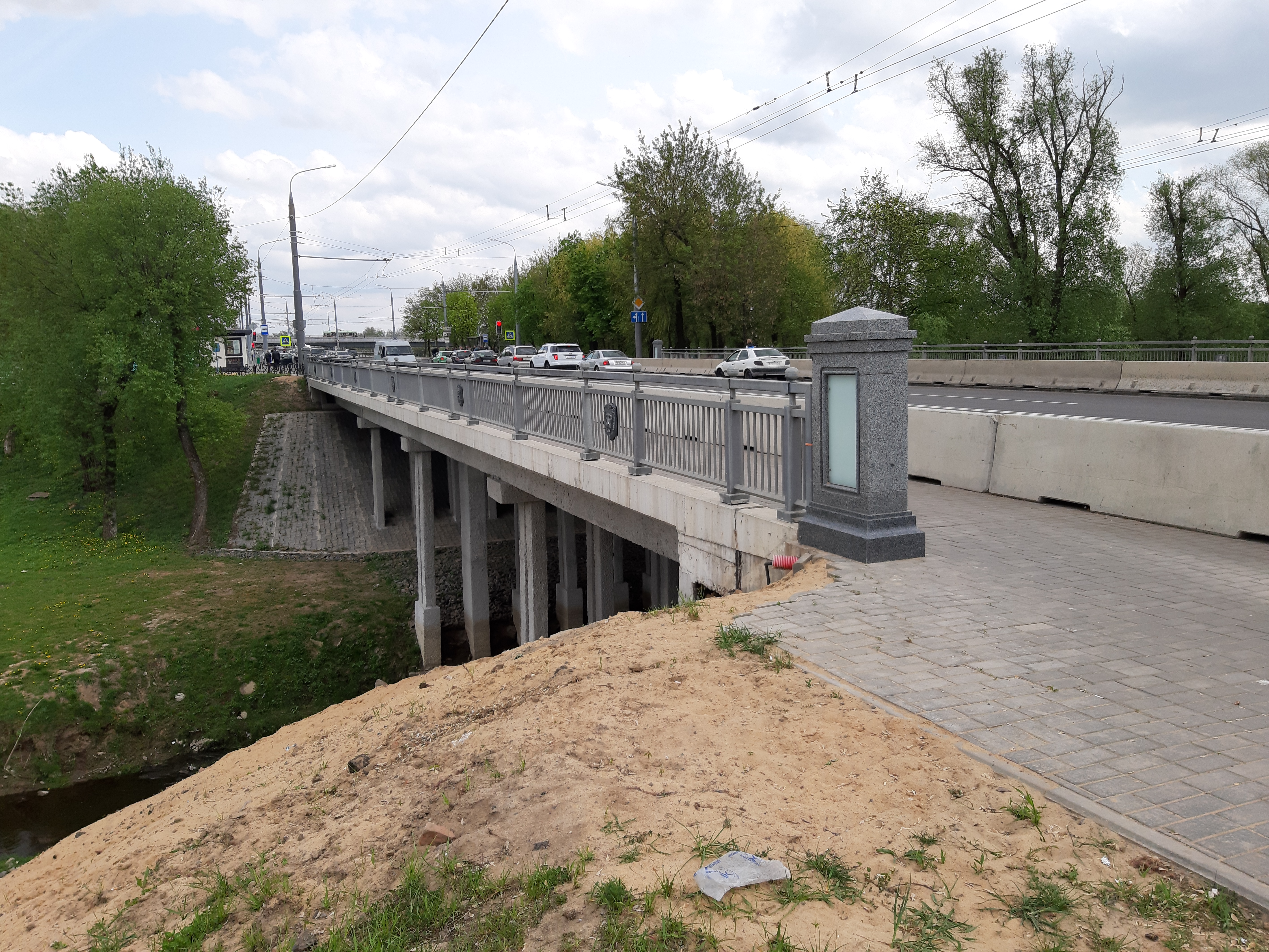 Магілёў. Па Чалюскінцаў да могілак